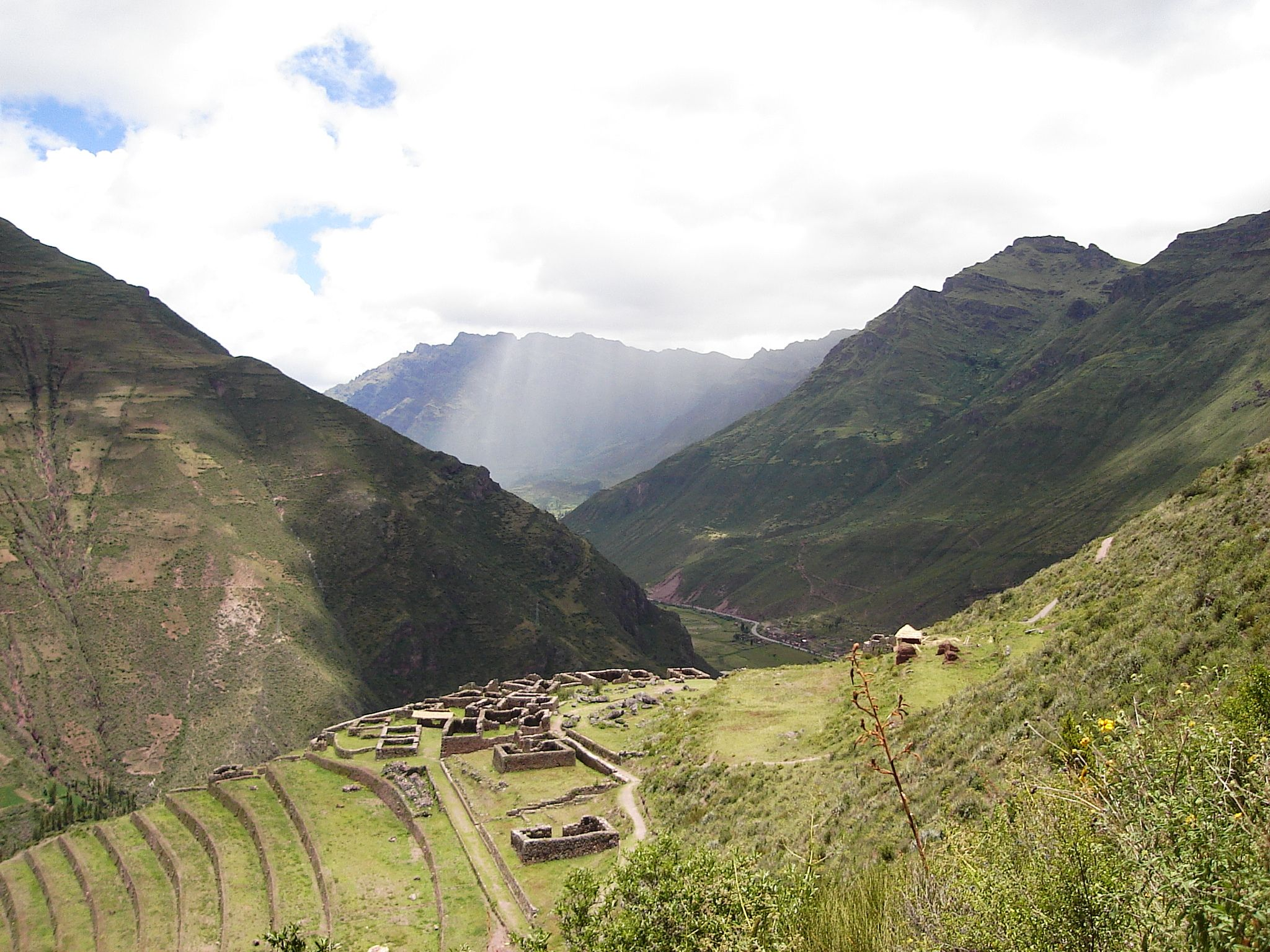 Foto tirada por mim, em Pisac.